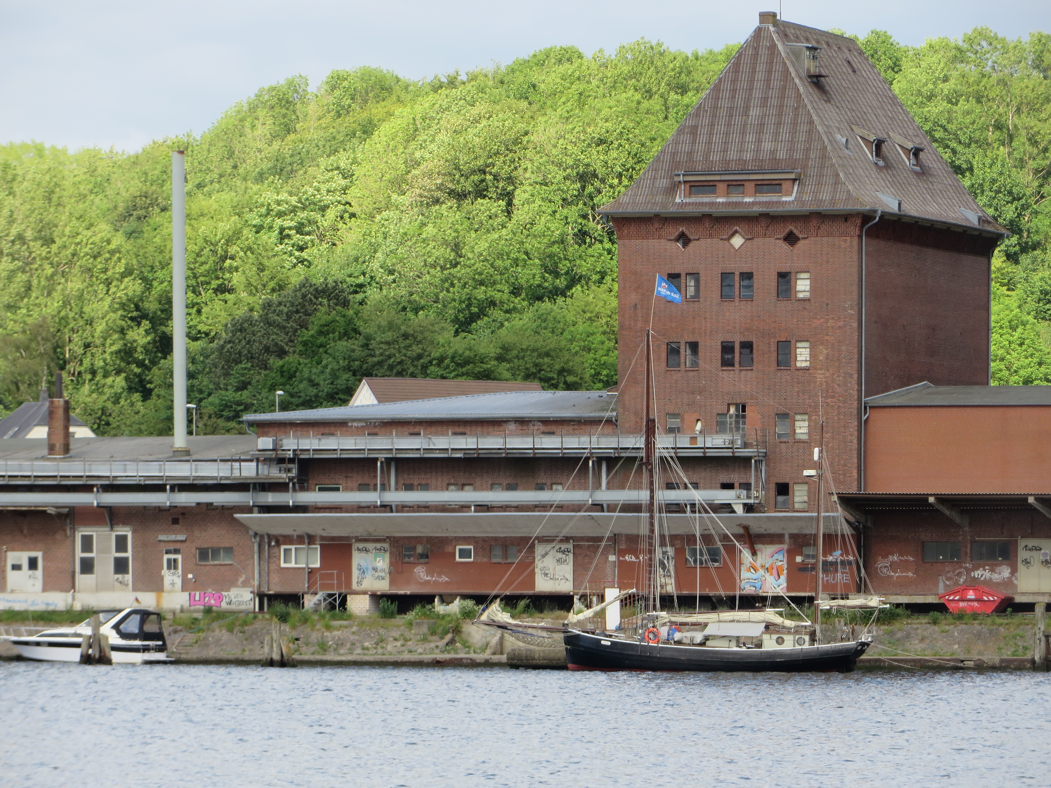 Ballastkai-Speicher von 1936, (Flensburg Juni 2015), Bild 02